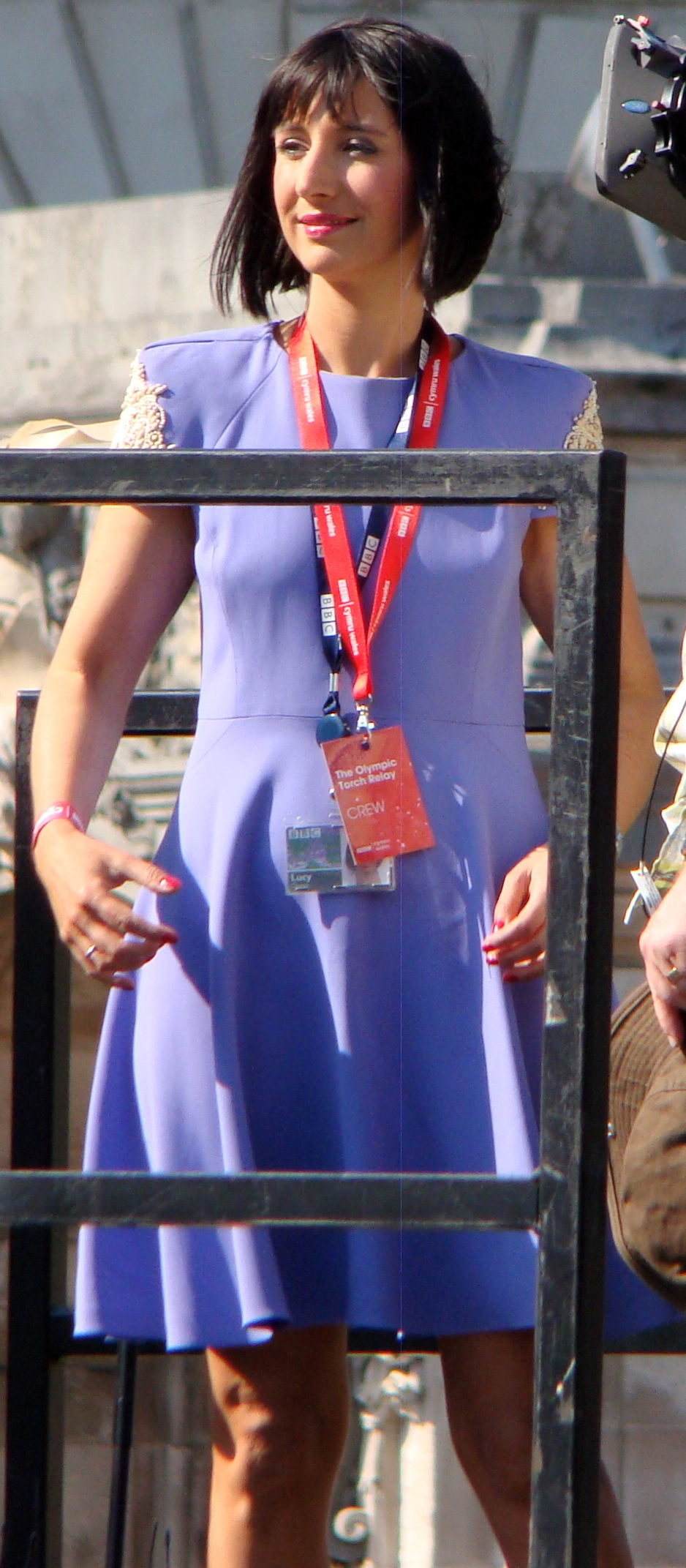 Lucy Owen.